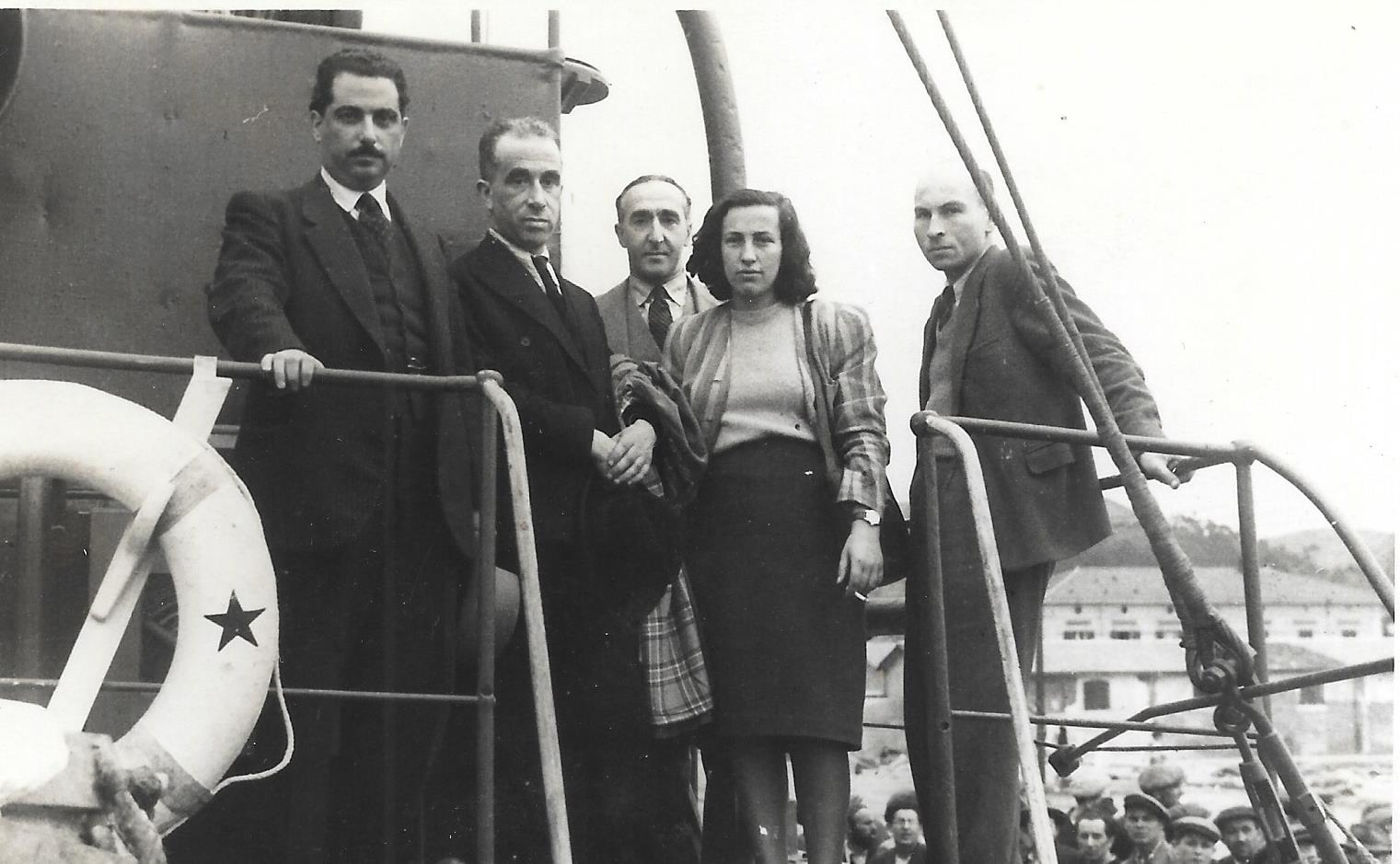 מארגני המחאה בפרשת לה ספציה, גב' עדה סירני שניה מימין ומר יהודה ארזי שני משמאל. אפריל 1946